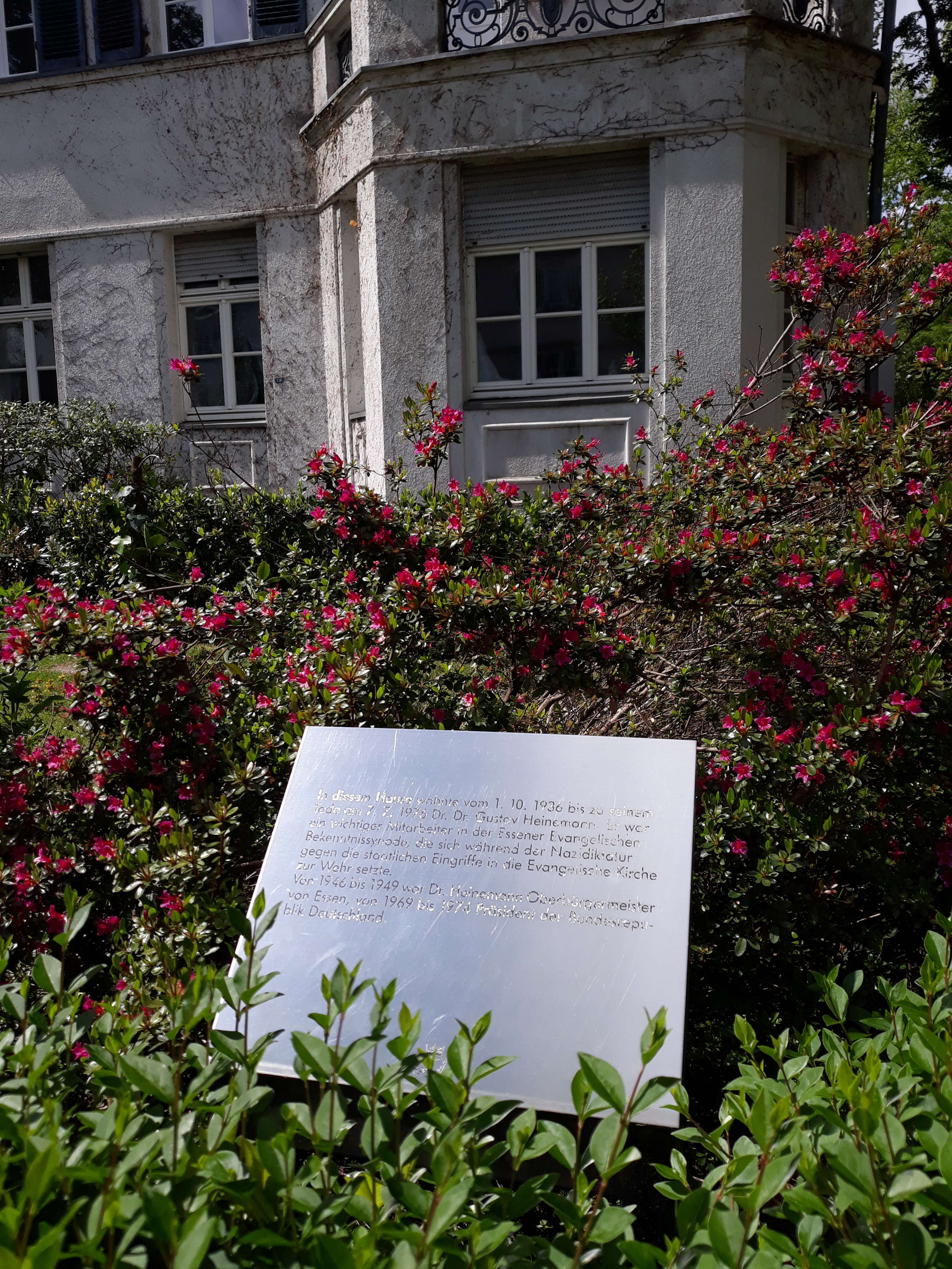 Gedenktafel am Wohnhaus des deutschen Politikers Gustav Heinemann (Bundespräsident 1969-1974) an seinem langjährigen Wohnhaus in der Schinkelstraße 34 in Essen.